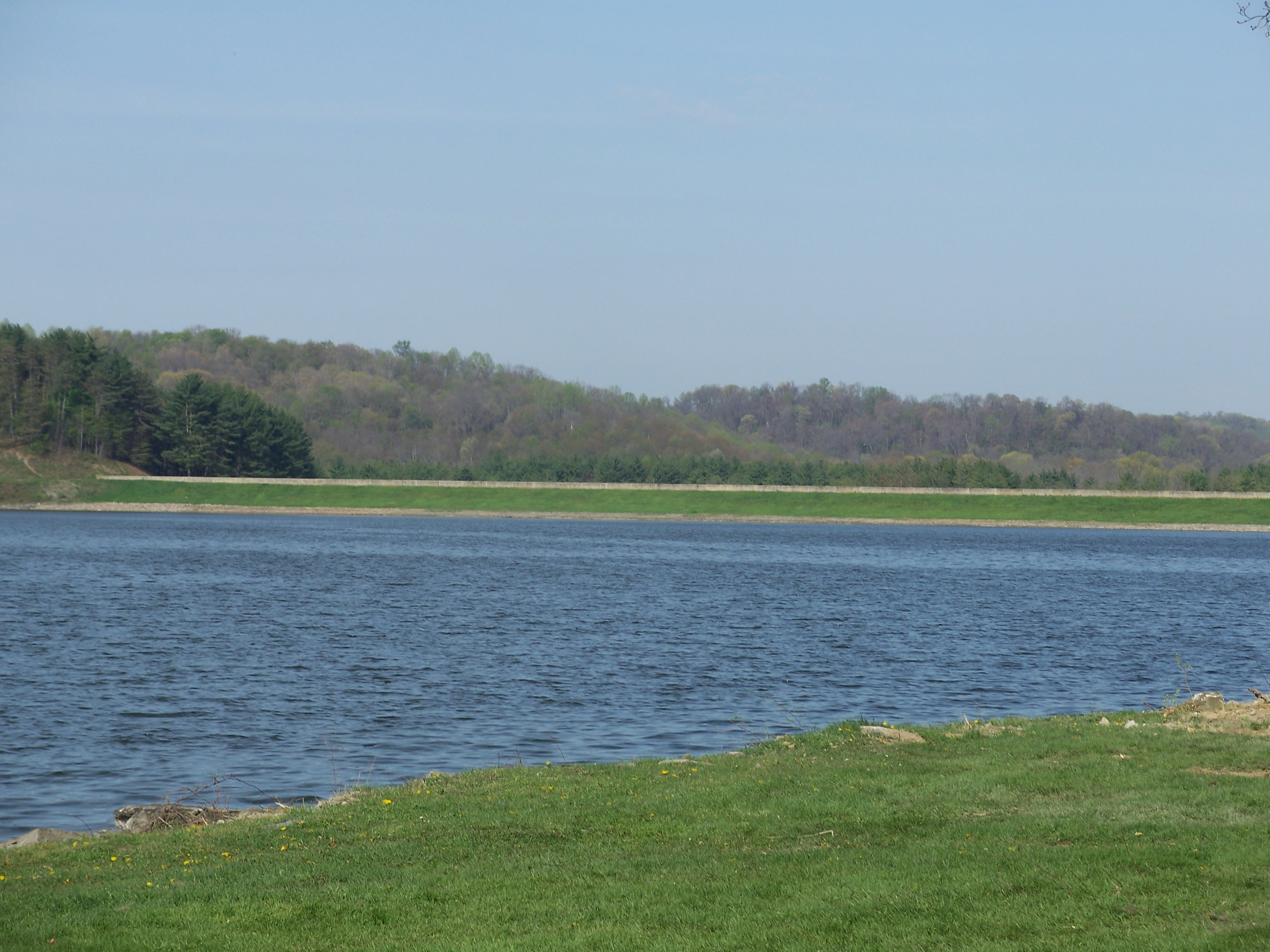 Tappan Lake